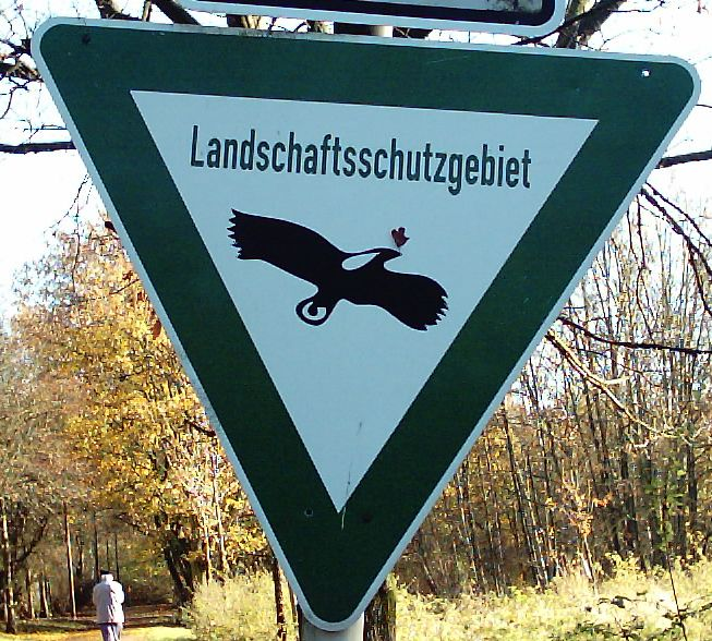 Landschaftsschutzgebiet-Schild